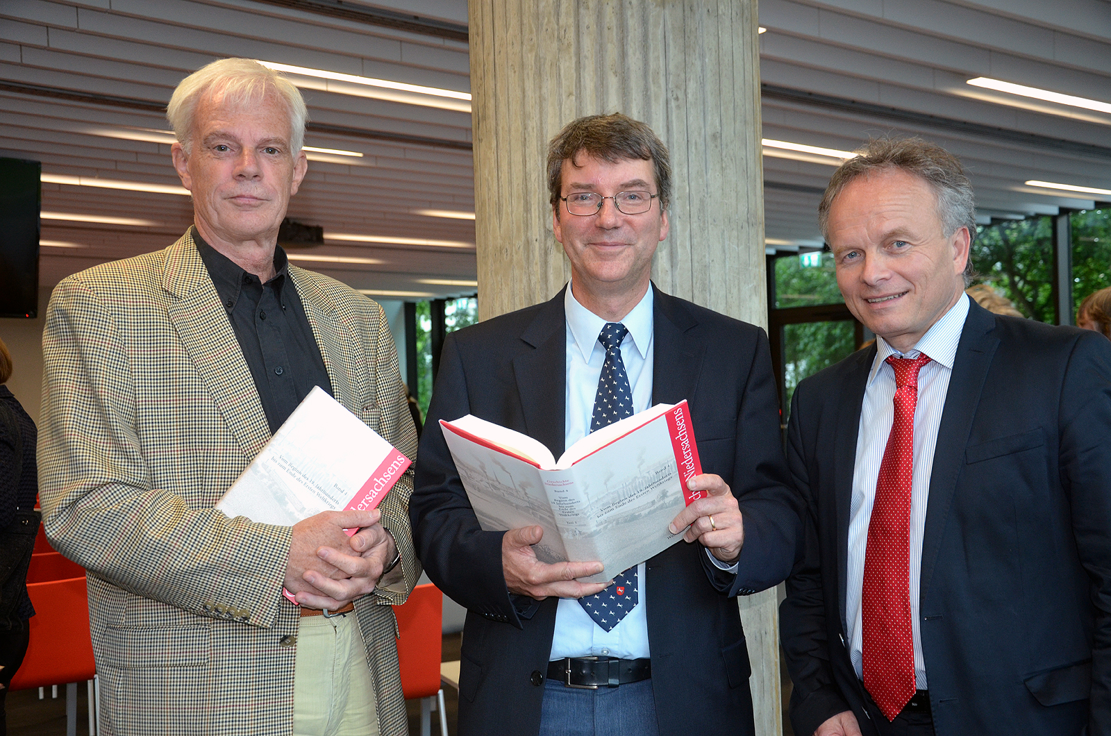 Nach der Vorstellung des Buches „Geschichte Niedersachsens Bd. 4:, Vom Beginn des 19. Jahrhunderts bis zum Ende des Ersten Weltkrieges“ in der Gottfried Wilhelm Leibniz Bibliothek – Niedersächsische Landesbibliothek (von links): Prof. Dr. Thomas Vogtherr (Vorsitzender der Historischen Kommission für Niedersachsen und Bremen), , Dr. Stefan Brüdermann (Herausgeber) sowie Prof. Thedel von Wallmoden (Verleger, Wallstein Verlag) ...